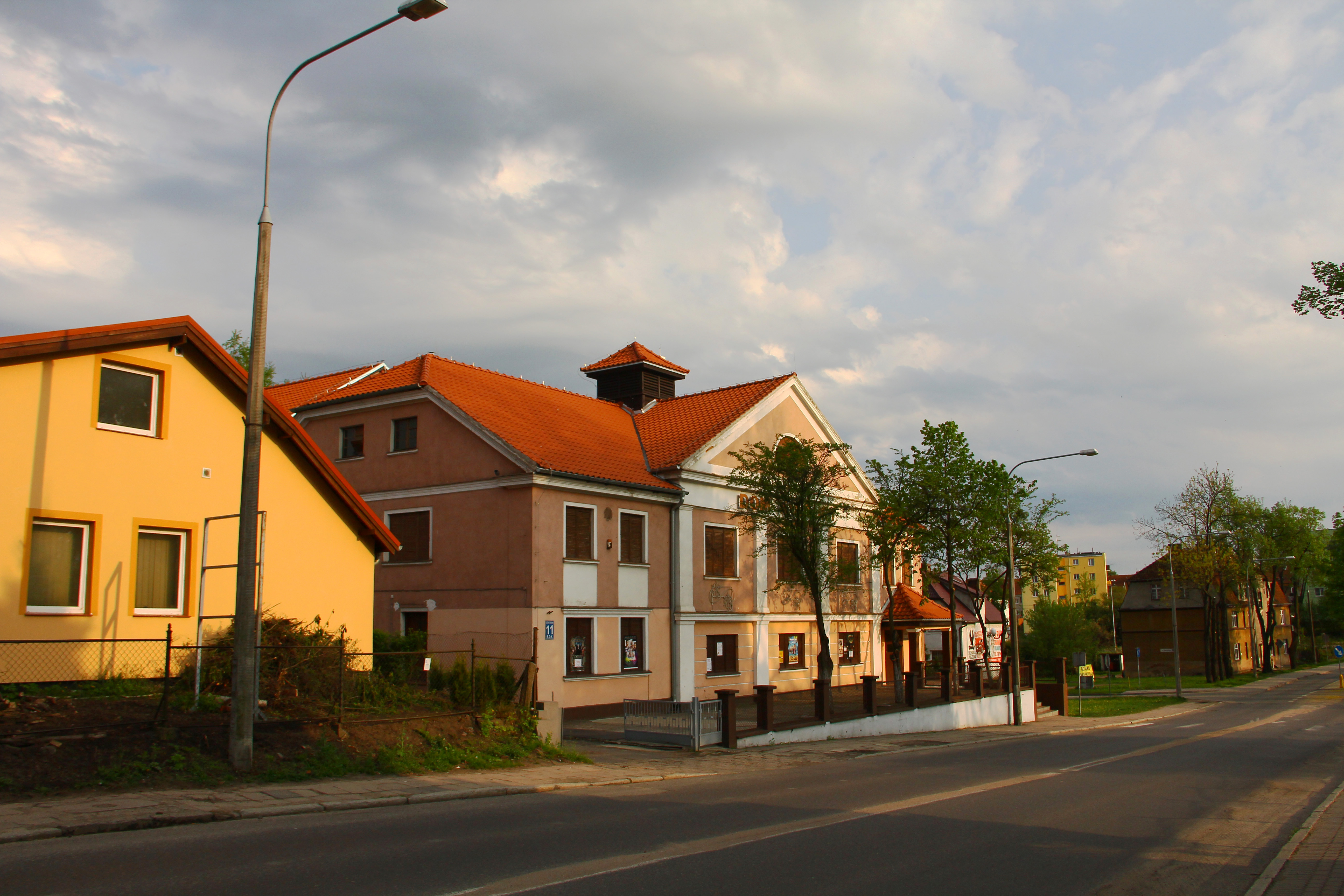 Bartoszyce. Bartoszycki Dom Kultury: ul. Bohaterów Warszawy.